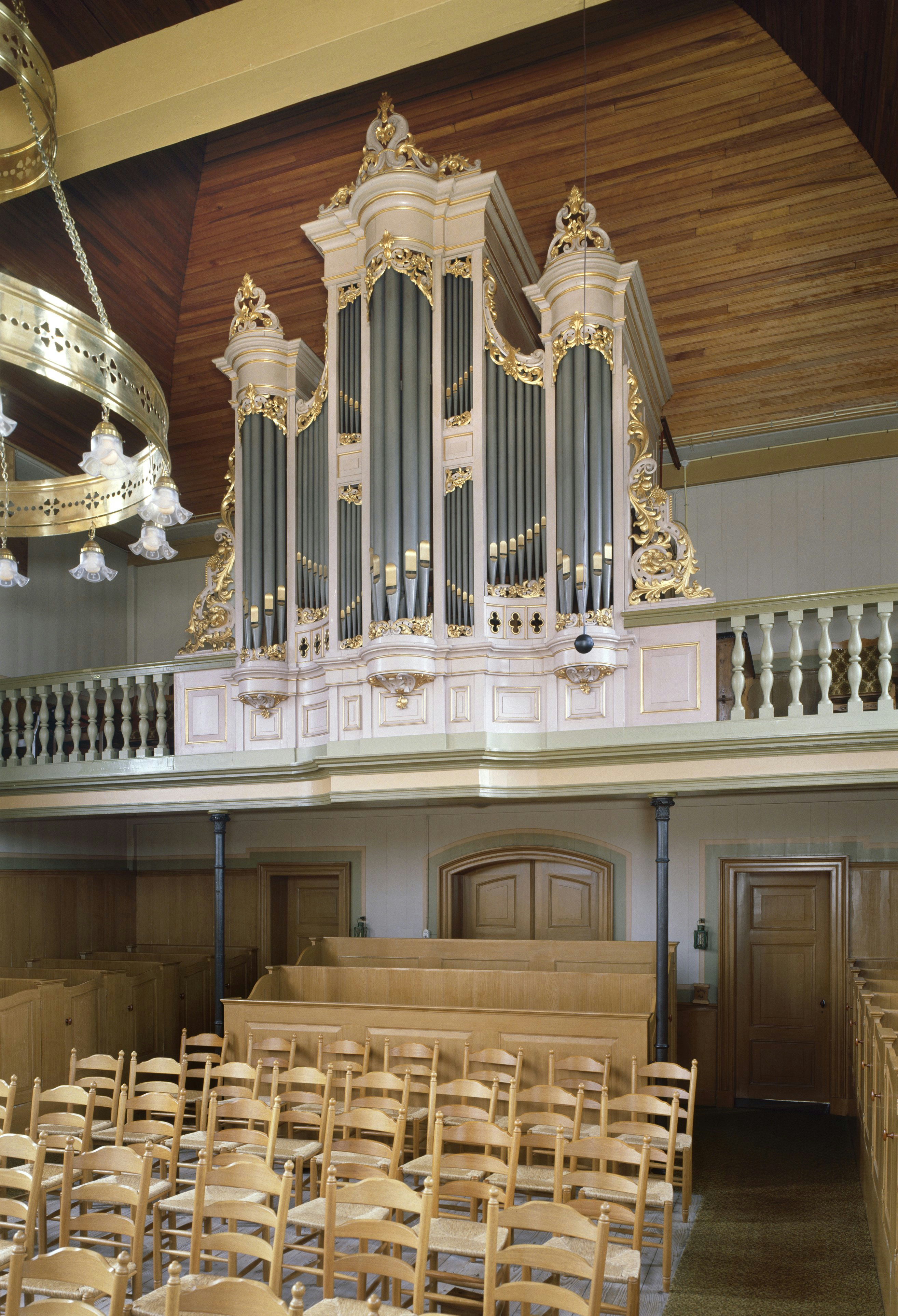 Gereformeerde Gemeente: Intenieur, aanzicht orgel, orgelnummer 1879 (opmerking: Gefotografeerd voor Het Historische Orgel in Nederland 1872-1878, bladzijde 228)